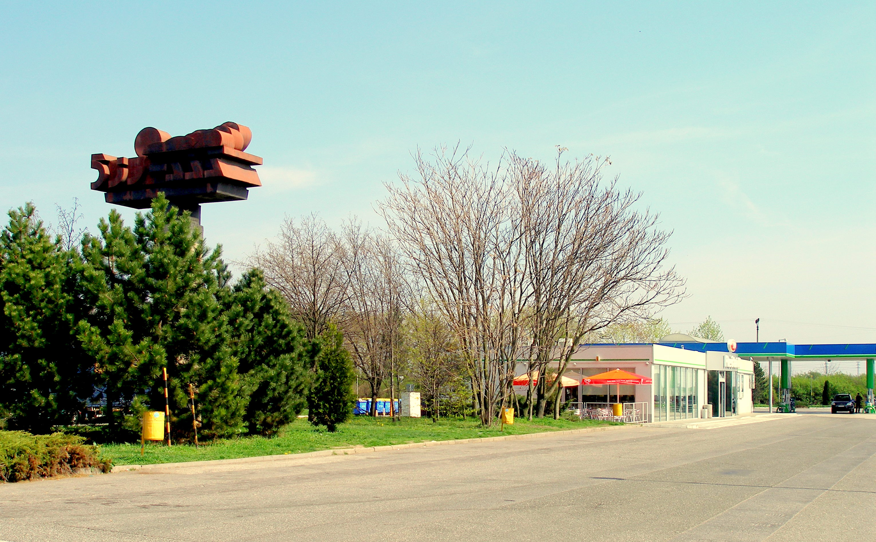 Zeleneč okres Trnava. Diaľničné odpočívadlo pri diaľnici pred Bratislavou na veľkonočný Veľký piatok 2009